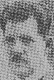 Arkitekten Uno Forthmeiier